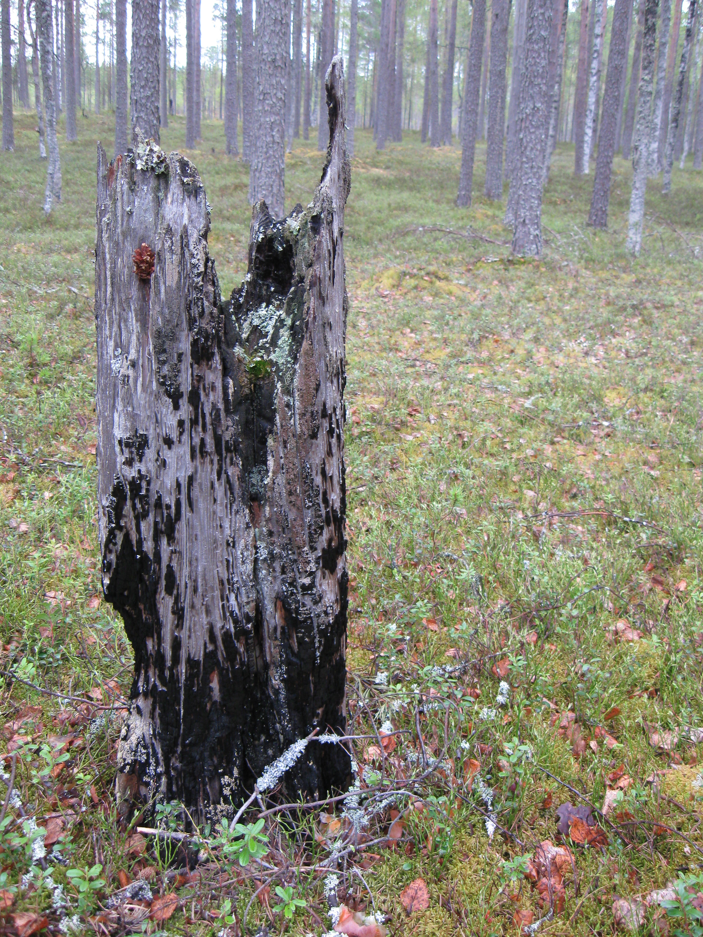 Tervaskanto Olvassuon luonnonpuiston alueella Utajärven Juorkunassa.